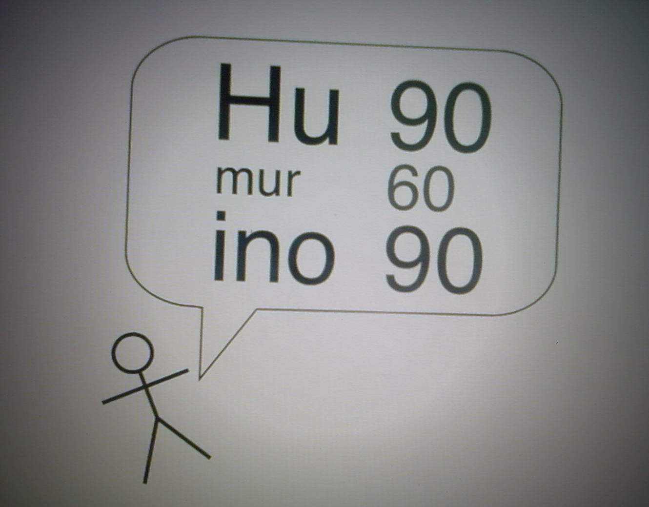 Amuza bildo pri Humurino en Odeso